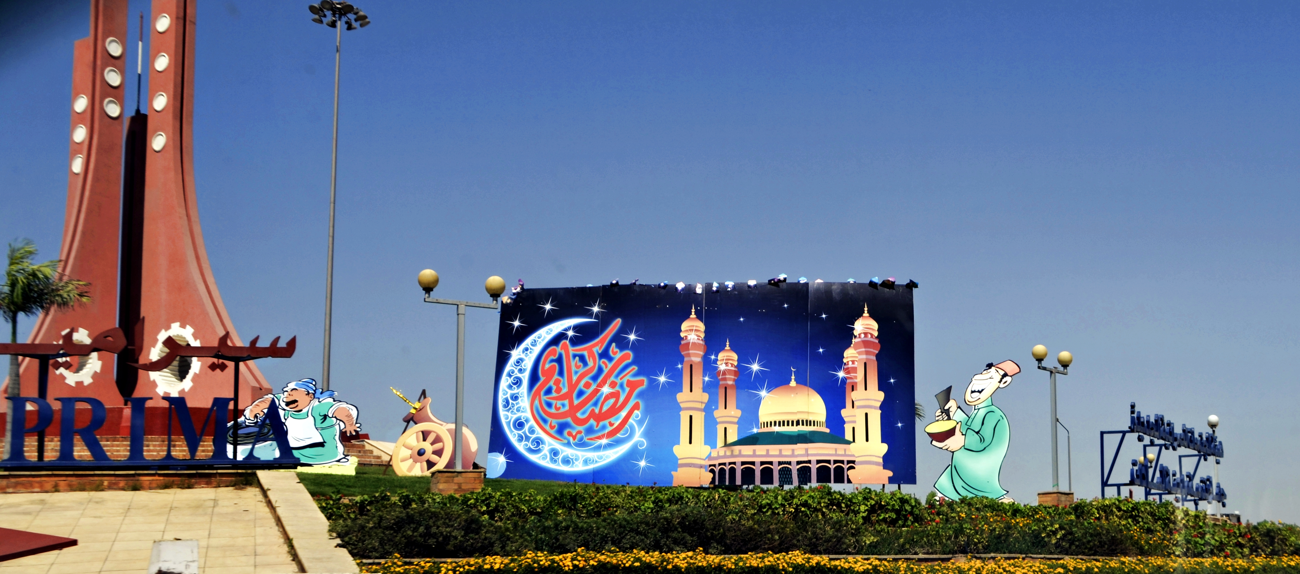 تهاني رمضان بميدان بريما بمدينة السادات.